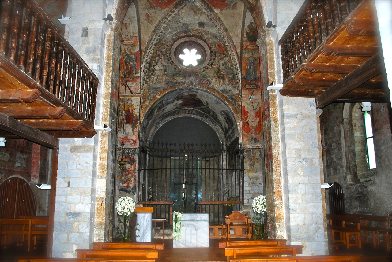 Esglesia de Sant Andreu de Salardú (Naut Aran)